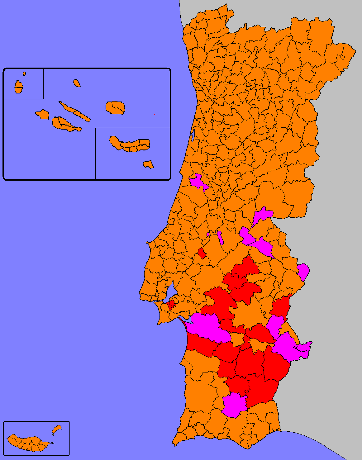 Mapa ilustrativo do partido mais votado por Concelho